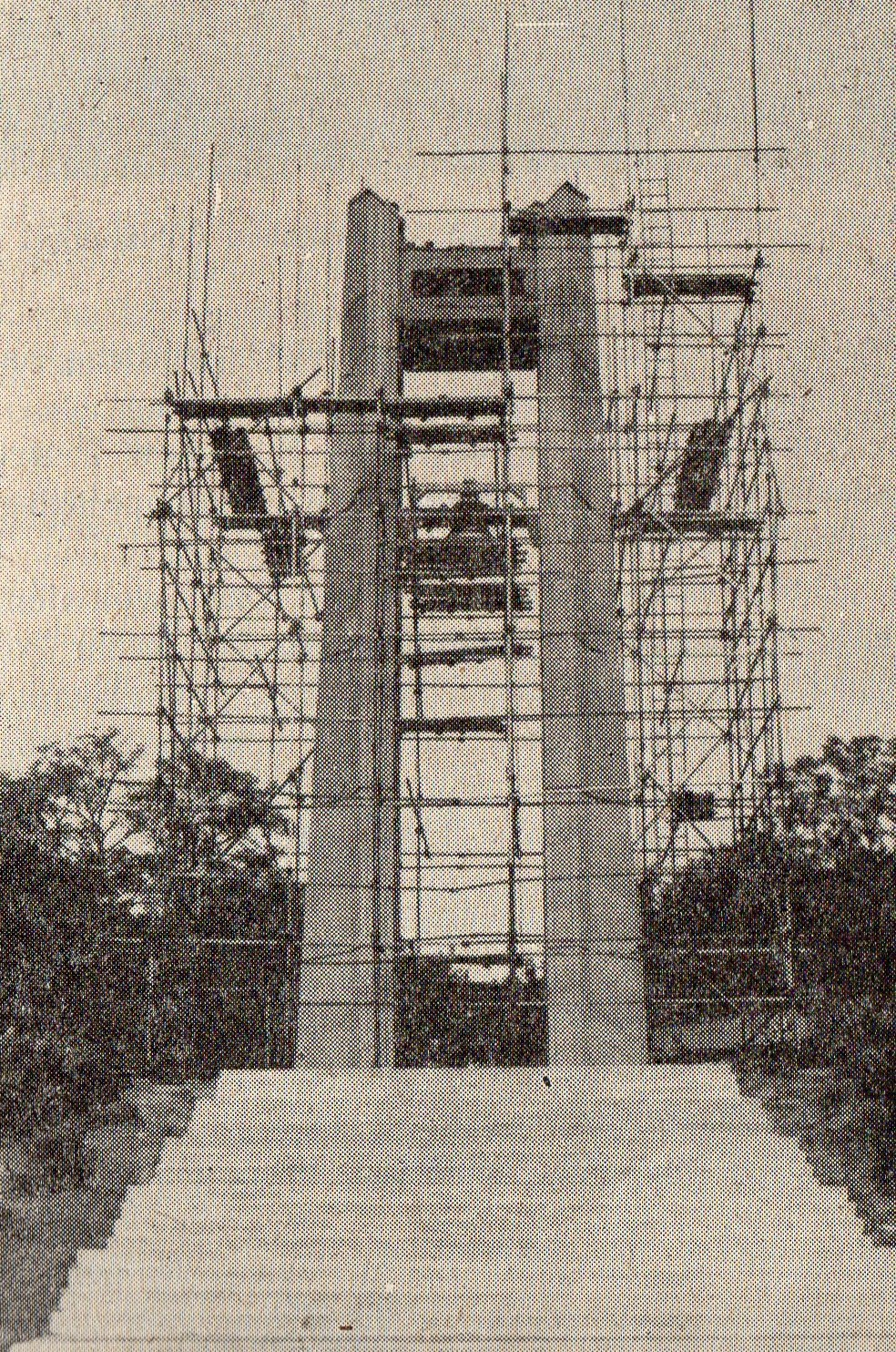 Budowa Dzwonu Pokoju w Poznaniu - 1 X 1986r.